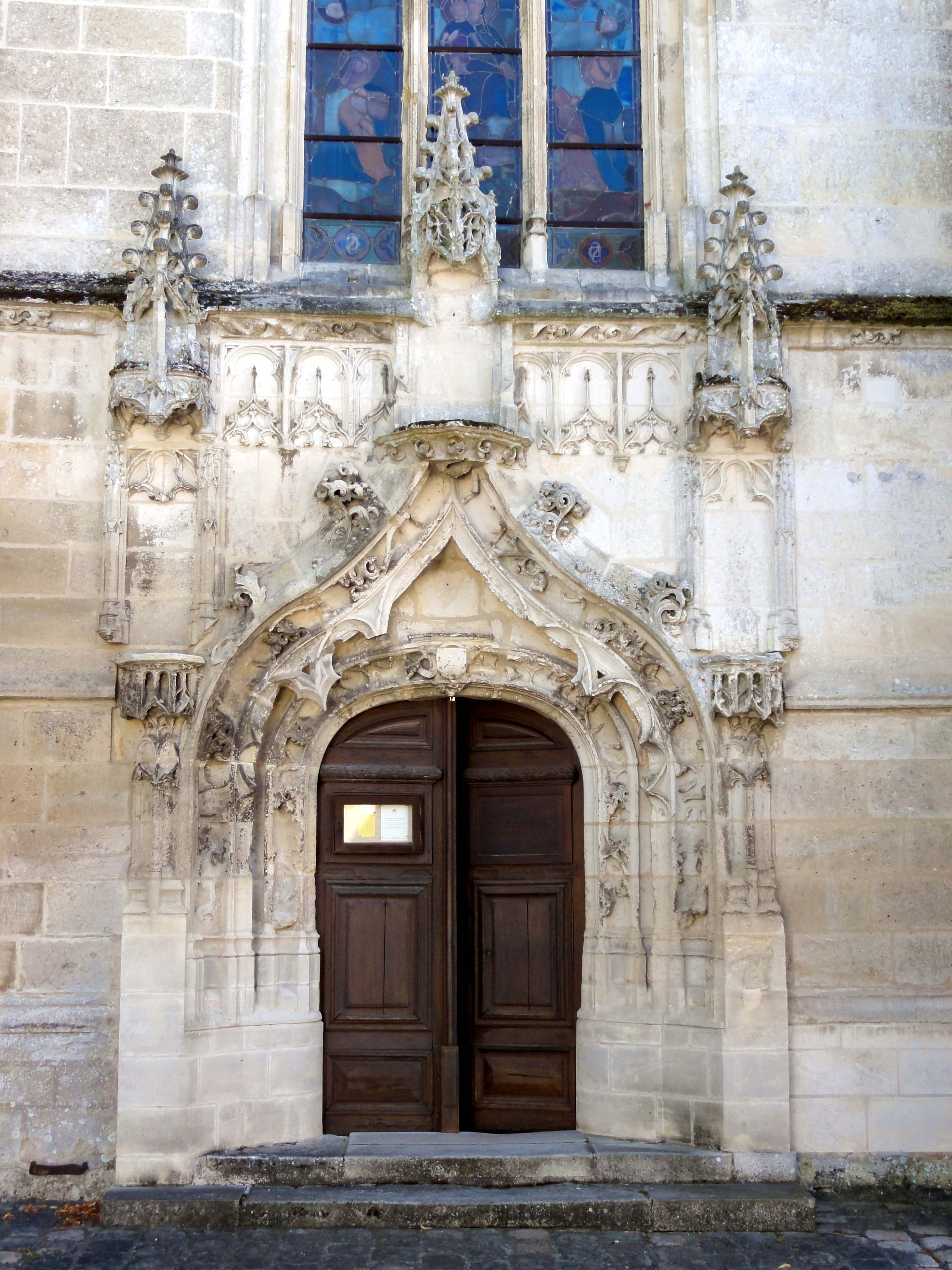 Église Saint-Nicolas de Raray (voir titre).